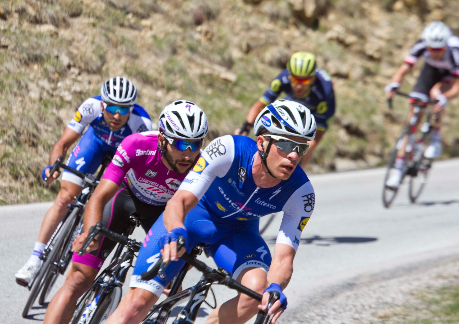 269 keisse gaviria